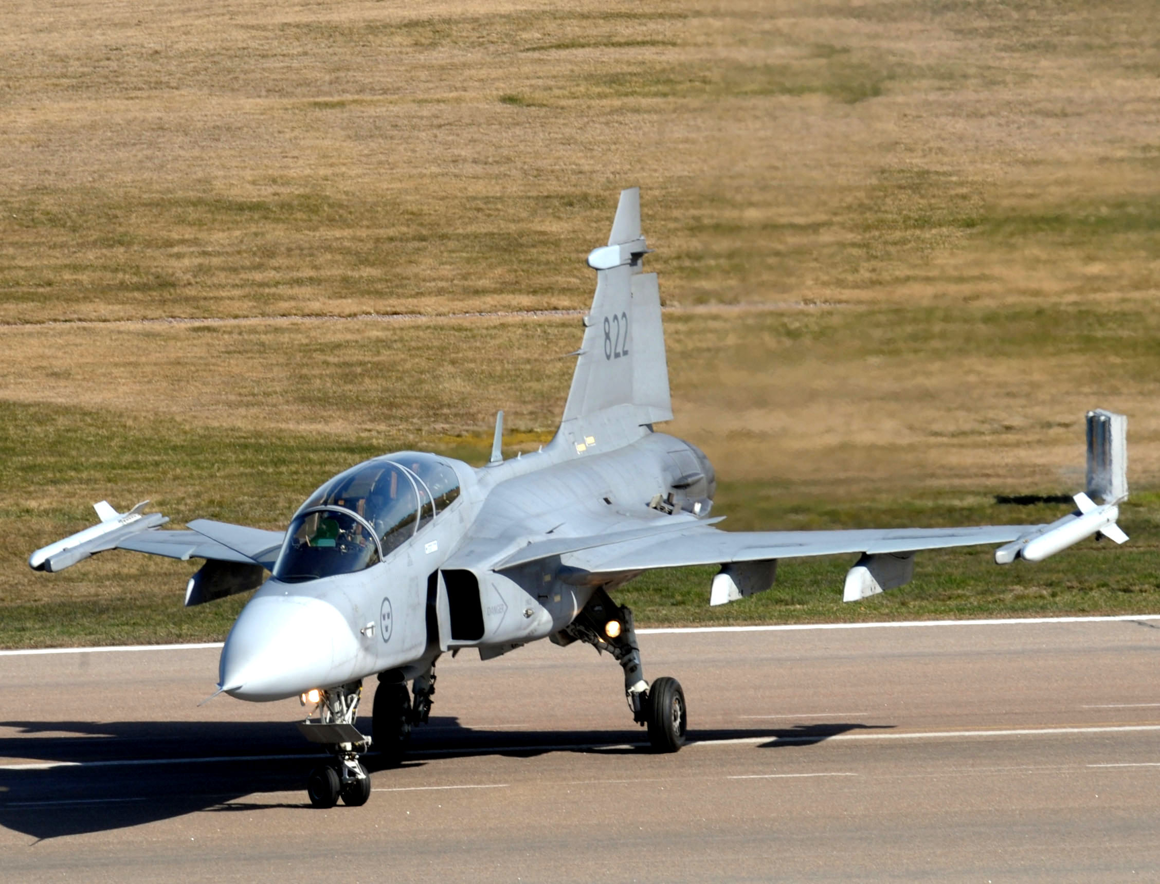 03/04/2014, Suécia Fotos: Jorge Cardoso